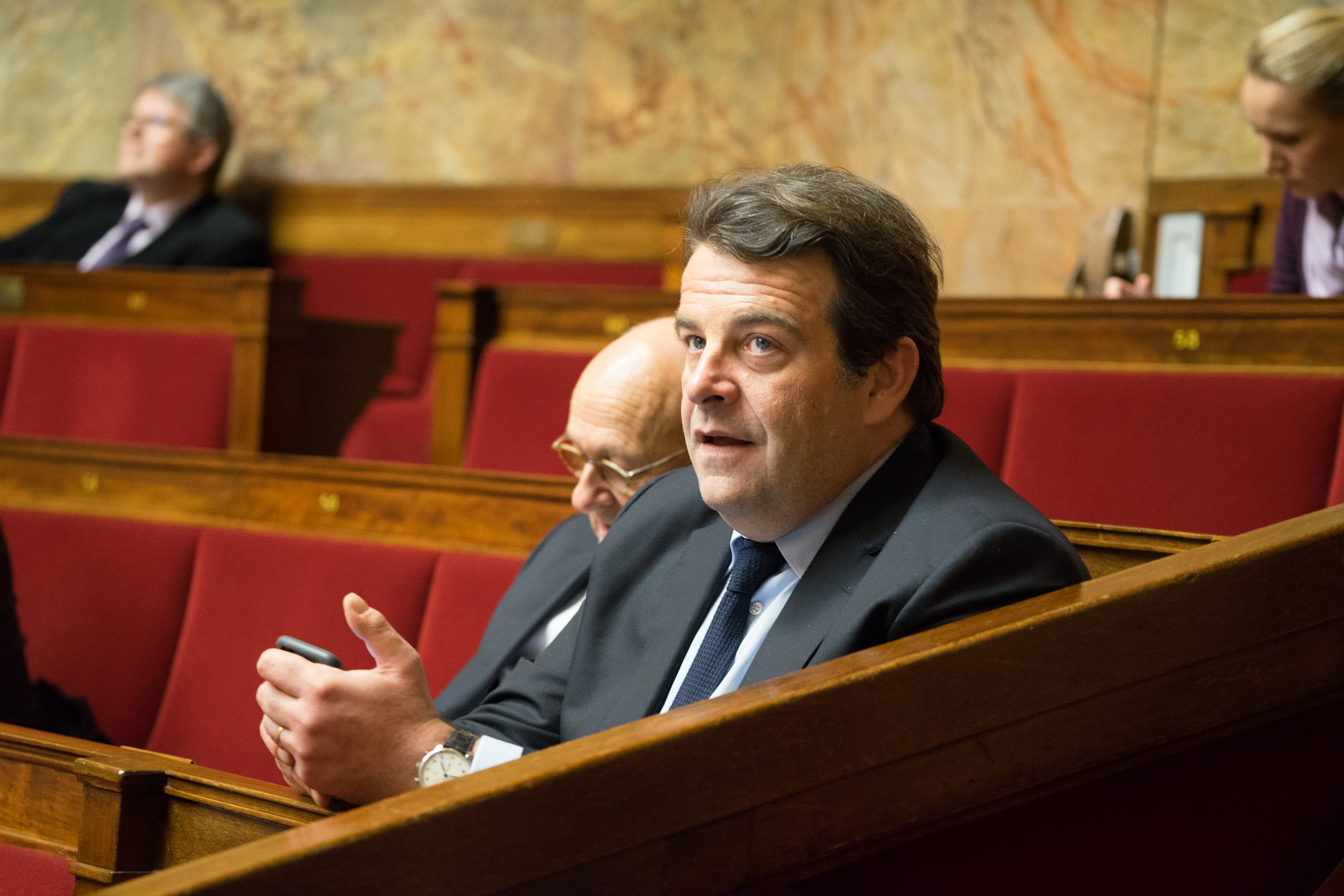 Thierry Solère - Assemblée nationale